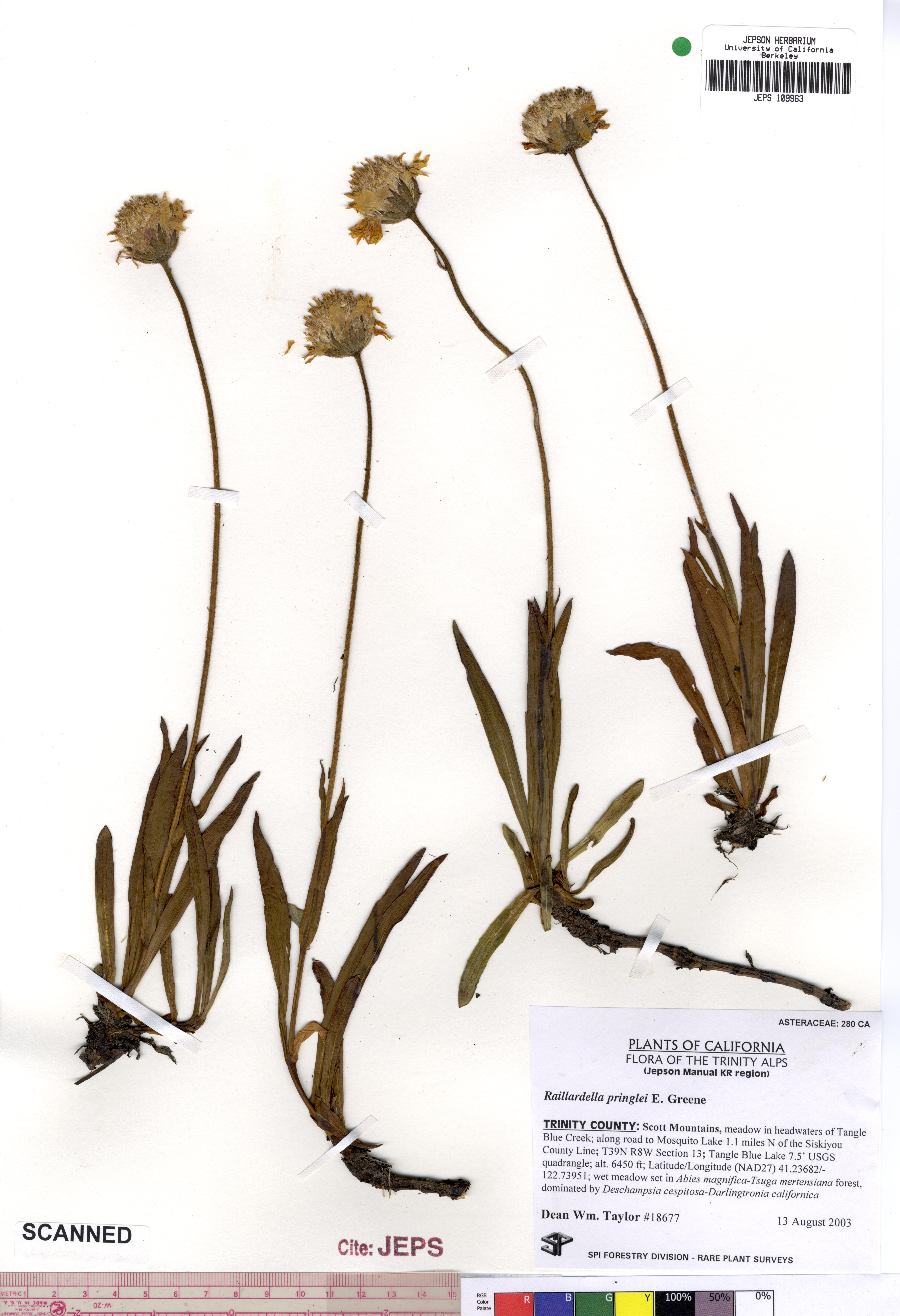 Raillardella pringlei JEPS109963